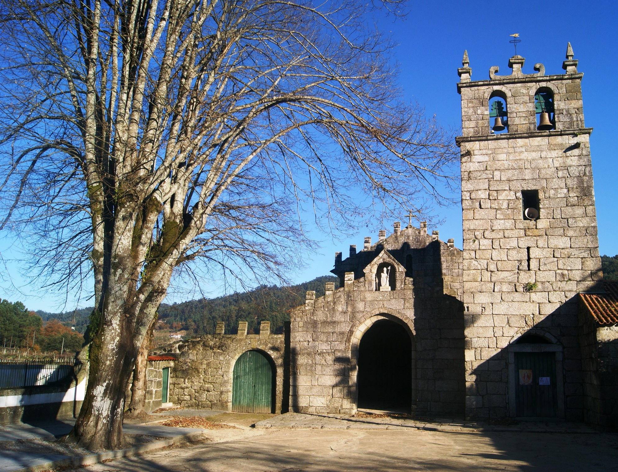 Amarante, Mancelos, Igreja Românica